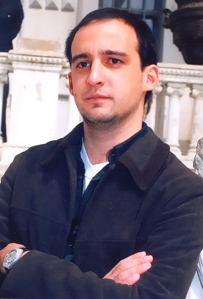 Director Alejandro Amenabar; exhibición pelicula Tesis; año 1998